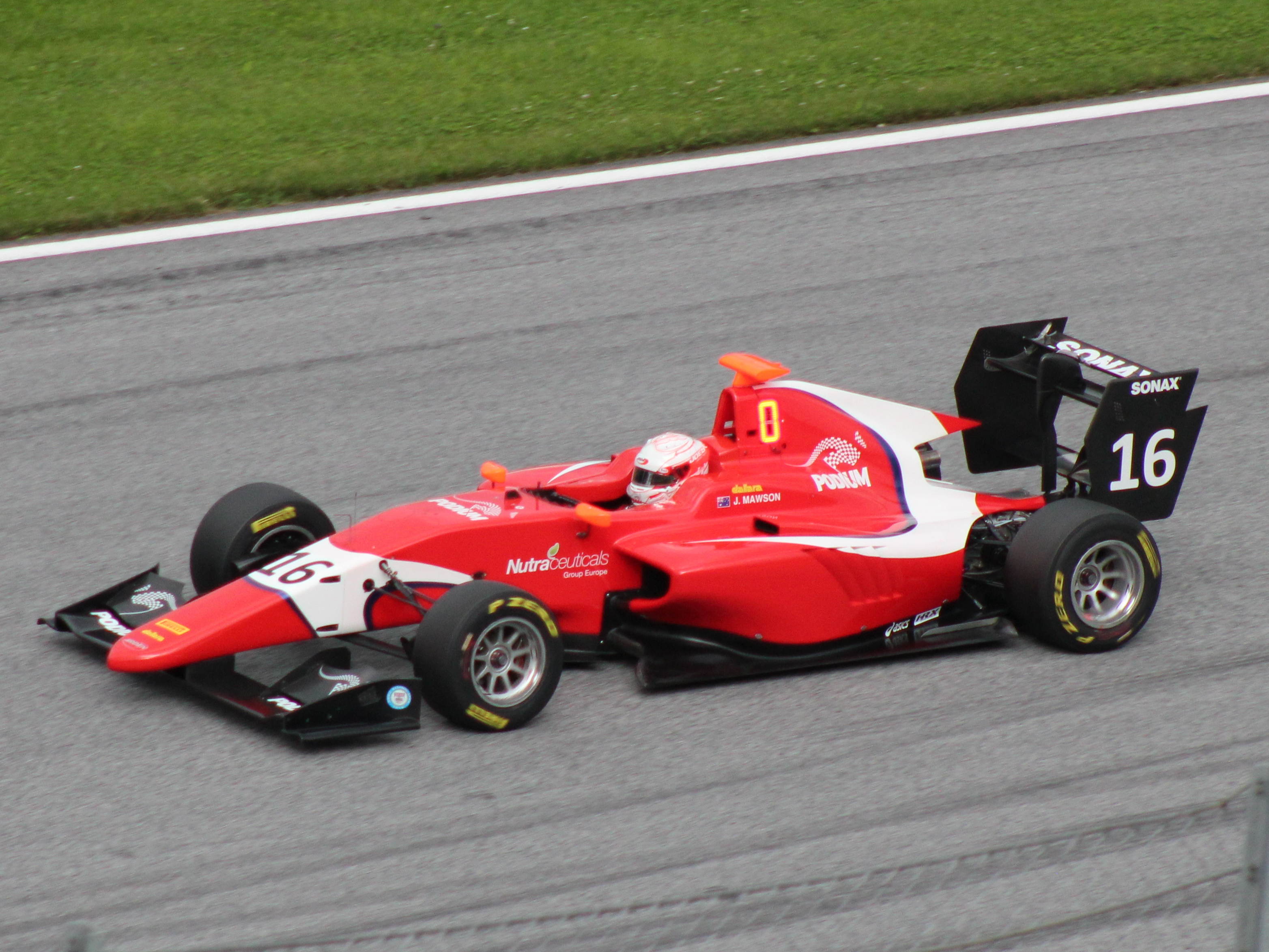 16 Joey Mawson beim Rennwochenende in Österreich 2018